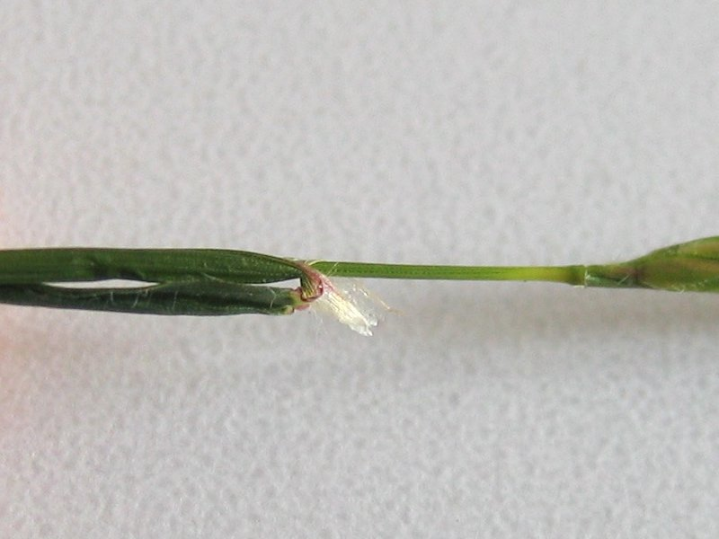 Haare an Blattscheide des Gewöhnlichen Ruchgrases Anthoxanthum odoratum